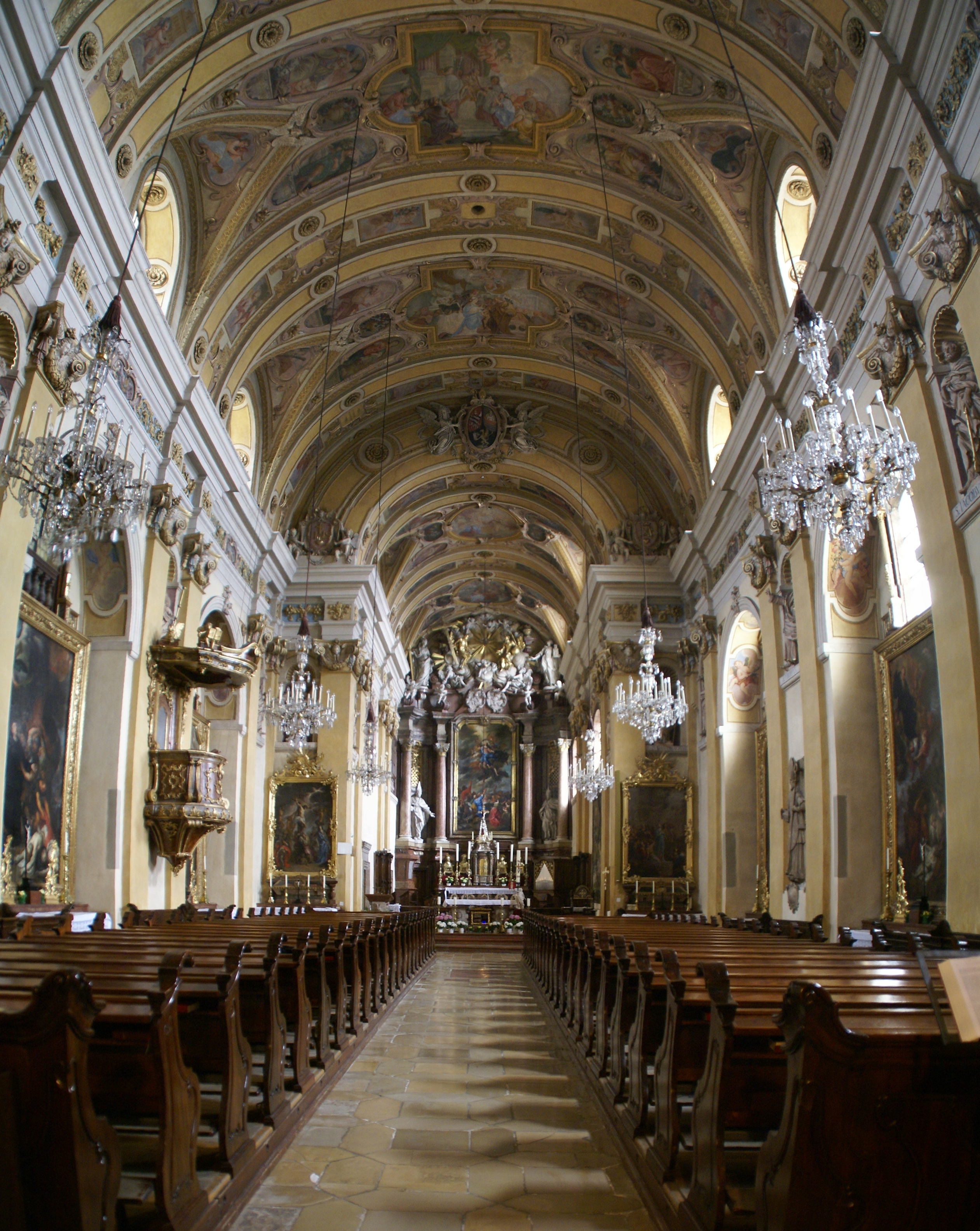 Stift Lambach - Stiftskirche